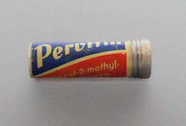 Tablettenröhrchen Pervitin, 0,003 gramm l-phenyl-2-methylamino-propan pro Tablette (1939).